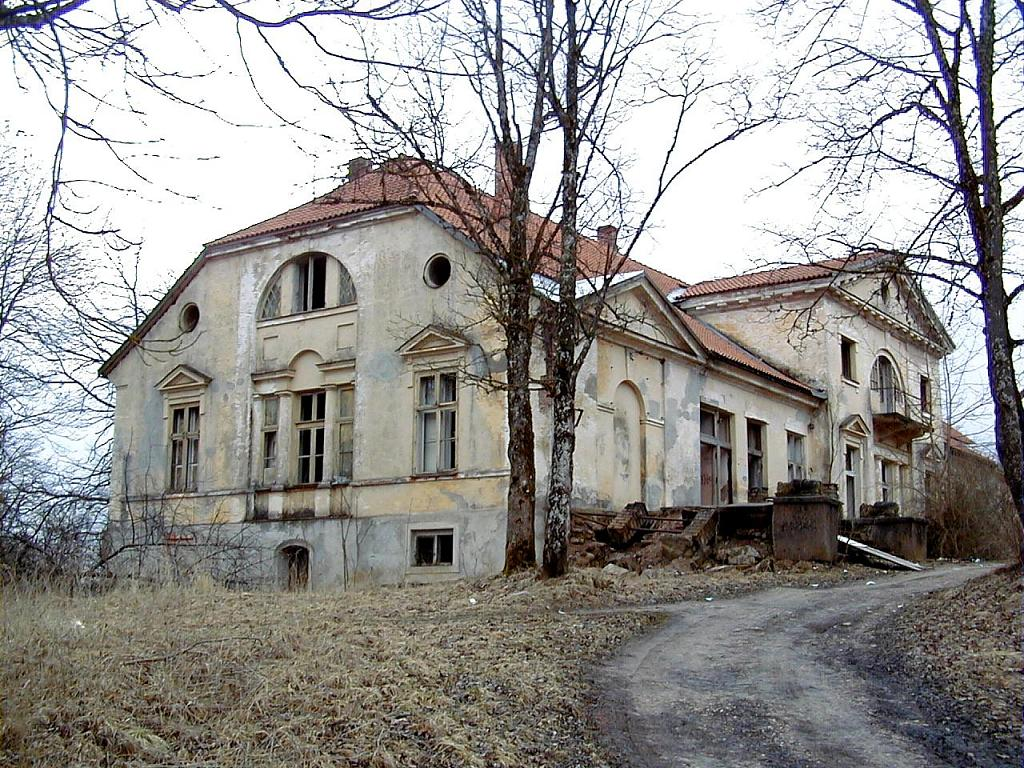 Gatartas muižas pils 2001-04-13